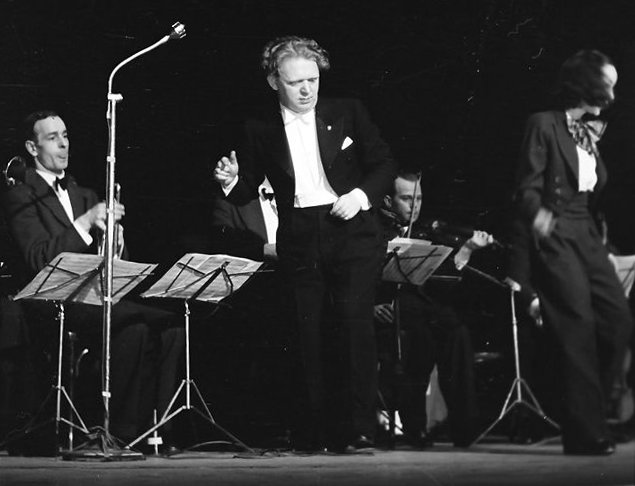 Kabarett der Komiker: Bernard Etté mit Orchester; dirigierend